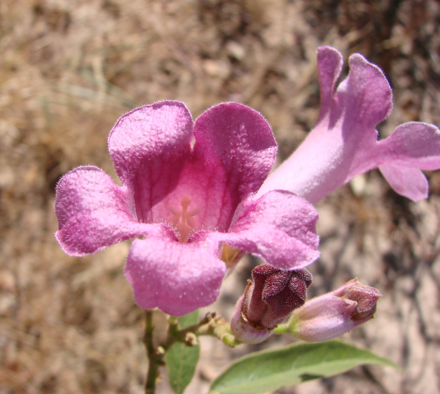 Cuspidaria sceptrum (Cham.) L.G.Lohmann - ( bas. Bignonia sceptrum Cham. ; sin. hom. Arrabidaea sceptrum (Cham.) Sandwith ) - BIGNONIACEAE - Parque Estadual dos Pirineus - Pirenópolis - Goiás - Brasil.